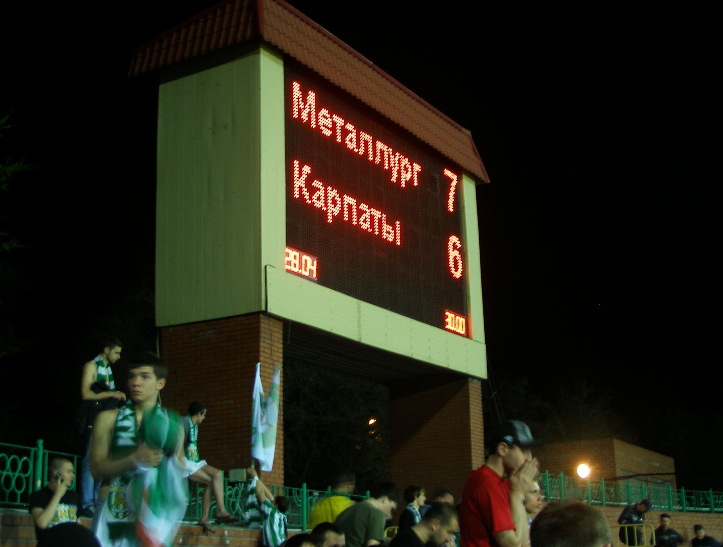 Табло після серії пенальті у півфіналі Кубка 2011/12. Металург Донецьк - Карпати Львів